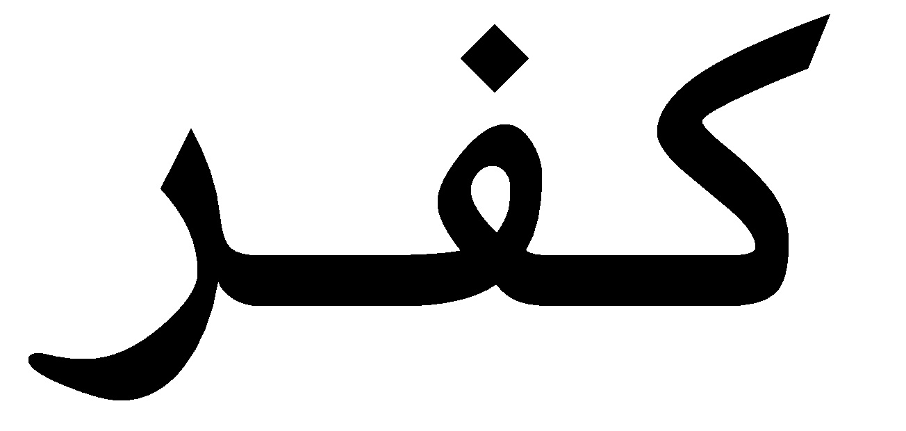 кафир